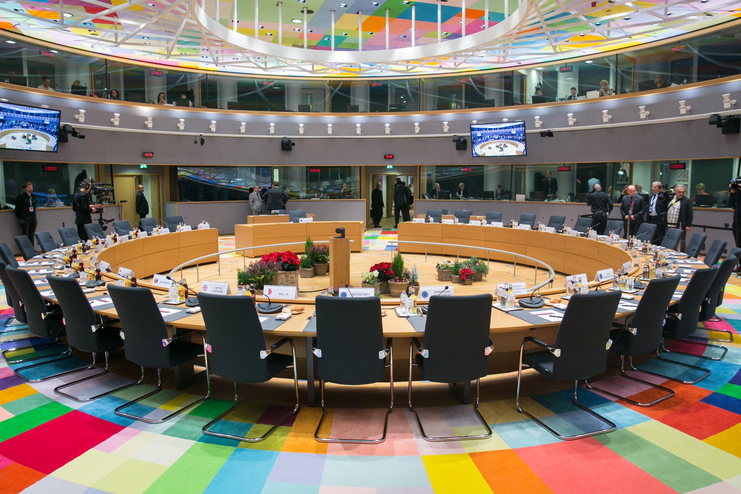 Photo: Tauno Tõhk (EU2017EE)